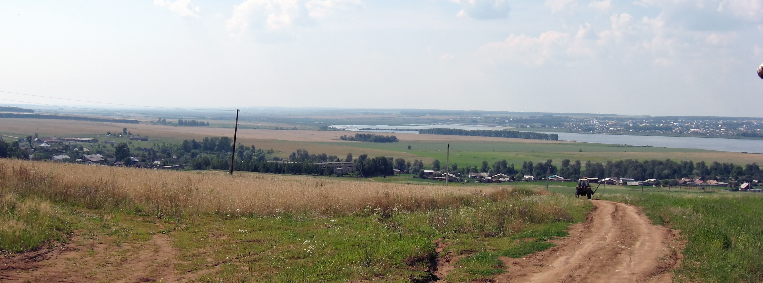 Посёлок совхоза имени Воровского, вид с севера. Вдали - Мензелинск.